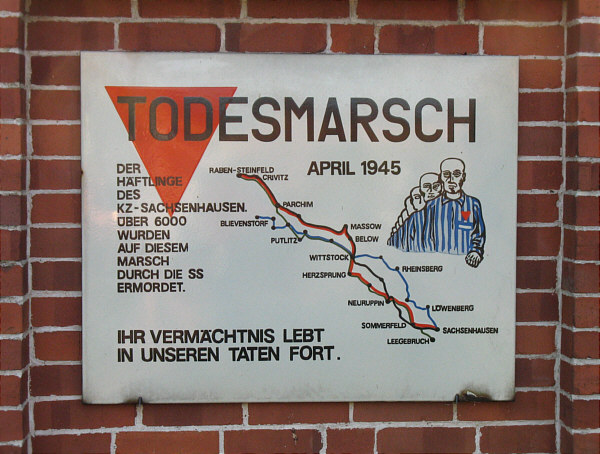 Todemarschschild in Wallitz bei Rheinsberg (Gedenktafel).